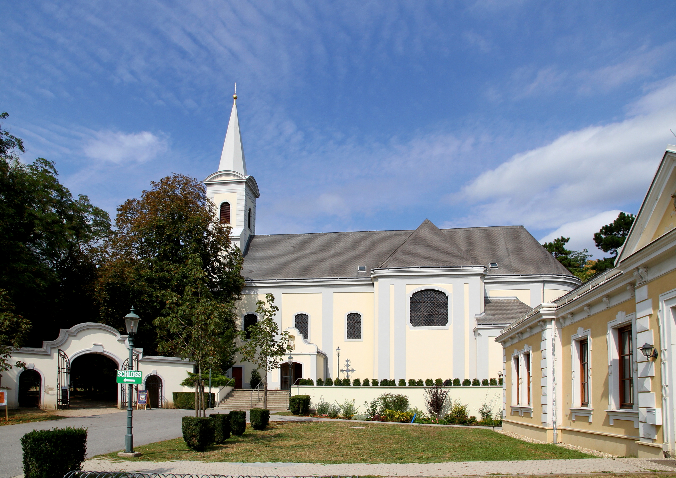 Die katholische Pfarrkirche hl. Joseph in der burgenländischen Gemeinde Halbturn.